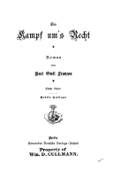 Karl Emil Franzos Ein Kampf um’s Recht Roman Band 1 Titel 1901